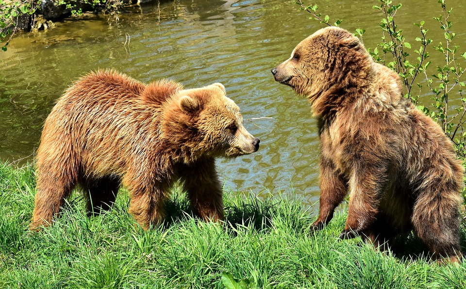 Hartz arrea